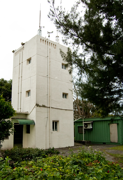 中文（台灣）: 淡水氣候觀測所2